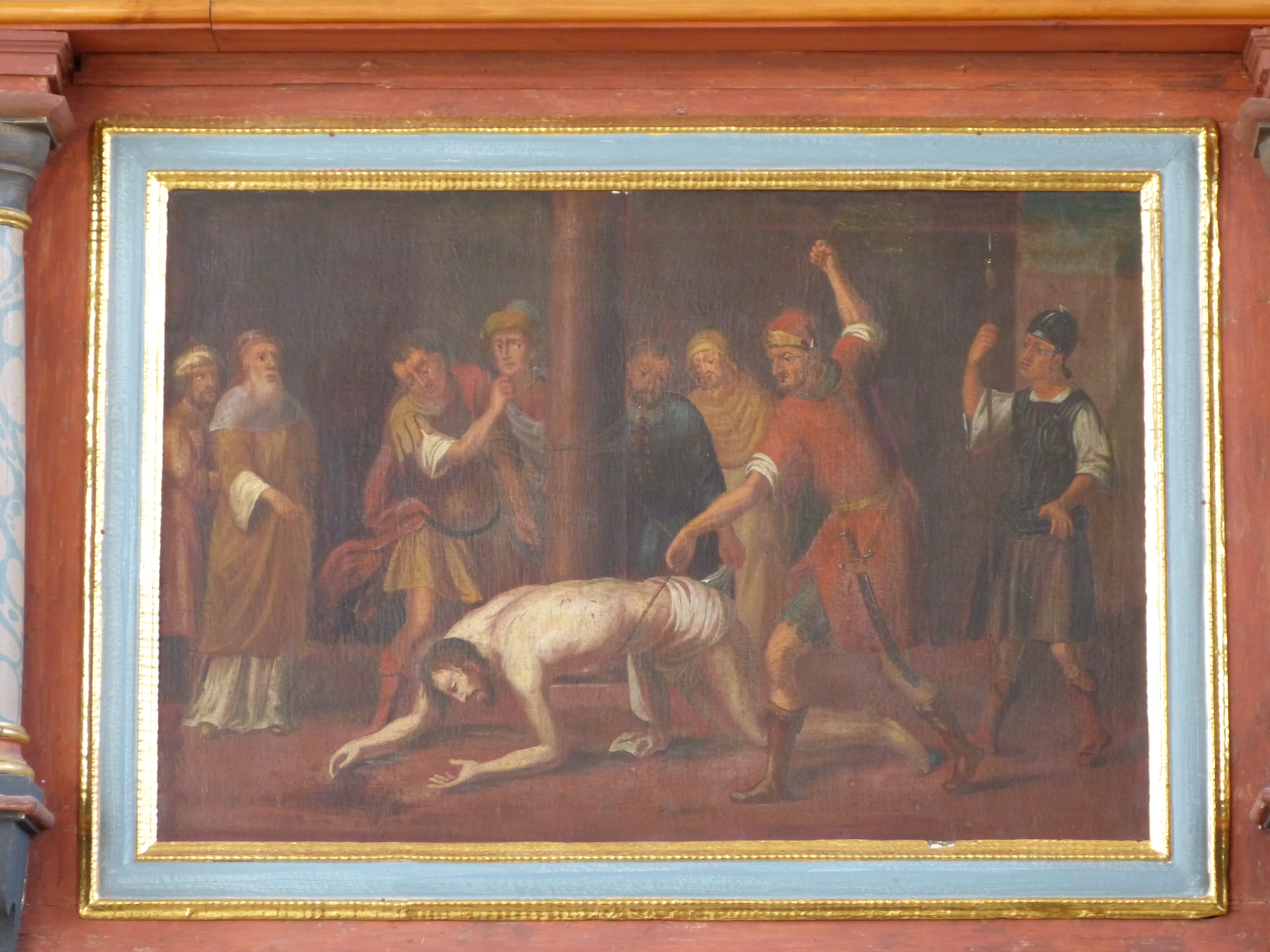 Mariä Himmelfahrt, Oberkammlach, Landkreis Unterallgäu, Bayern